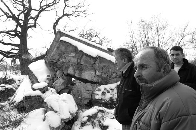 Косово и Метохија: Срушена српска православна црква у селу Ђураковац. Фотографије из пројекта "Корени душе". Фото:Дарко Дозет